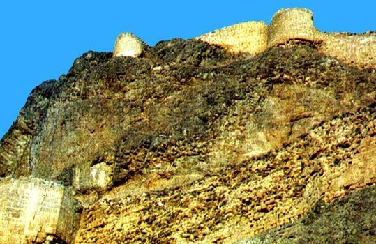 قلعه قهقهه در مشکین شهر استان اردبیل